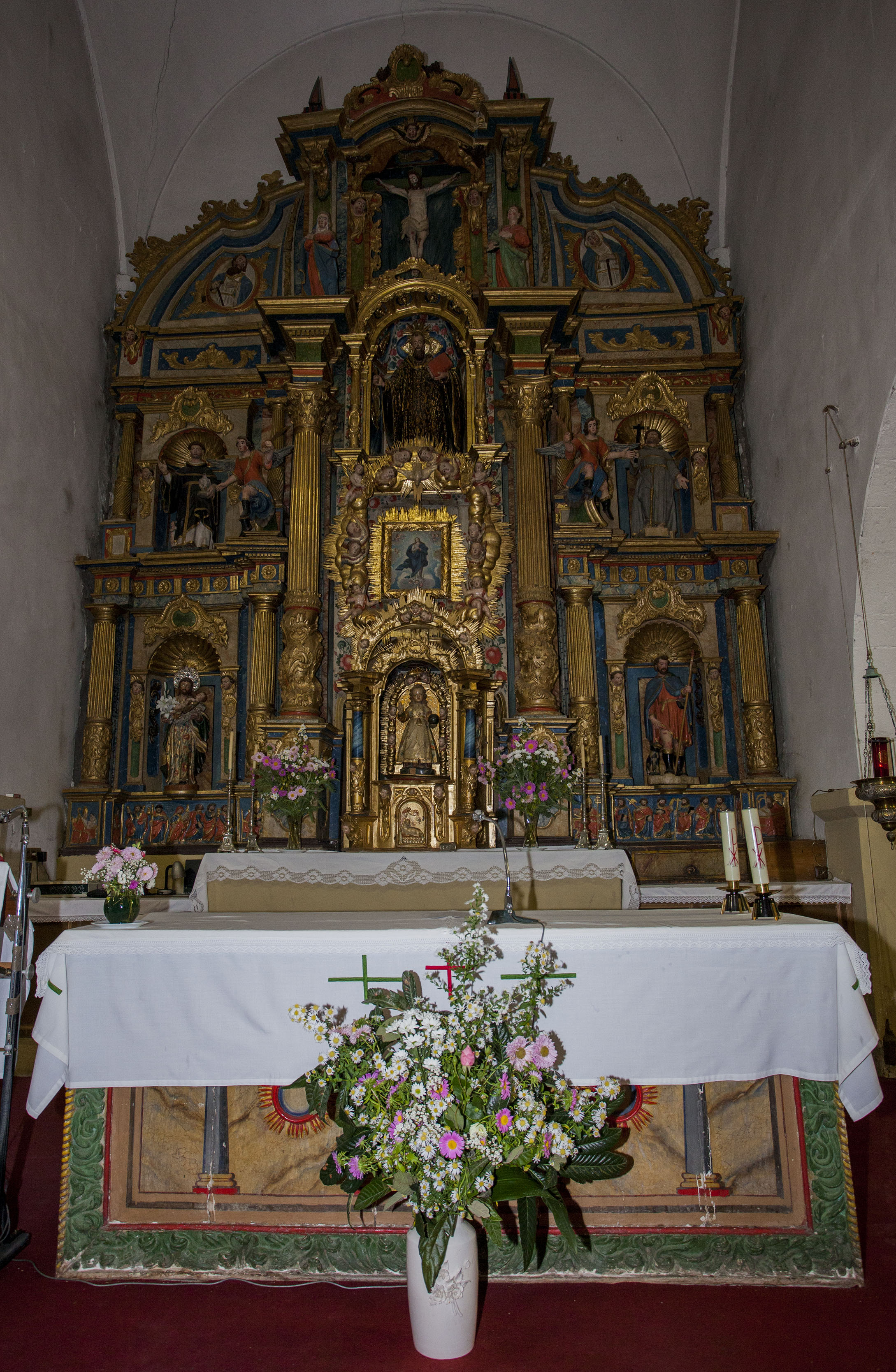 Imagen del altar mayor y su retablo en la iglesia parroquial de San Millán de Albares de la Ribera